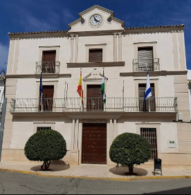 Fachada del Ayuntamiento de Gilena